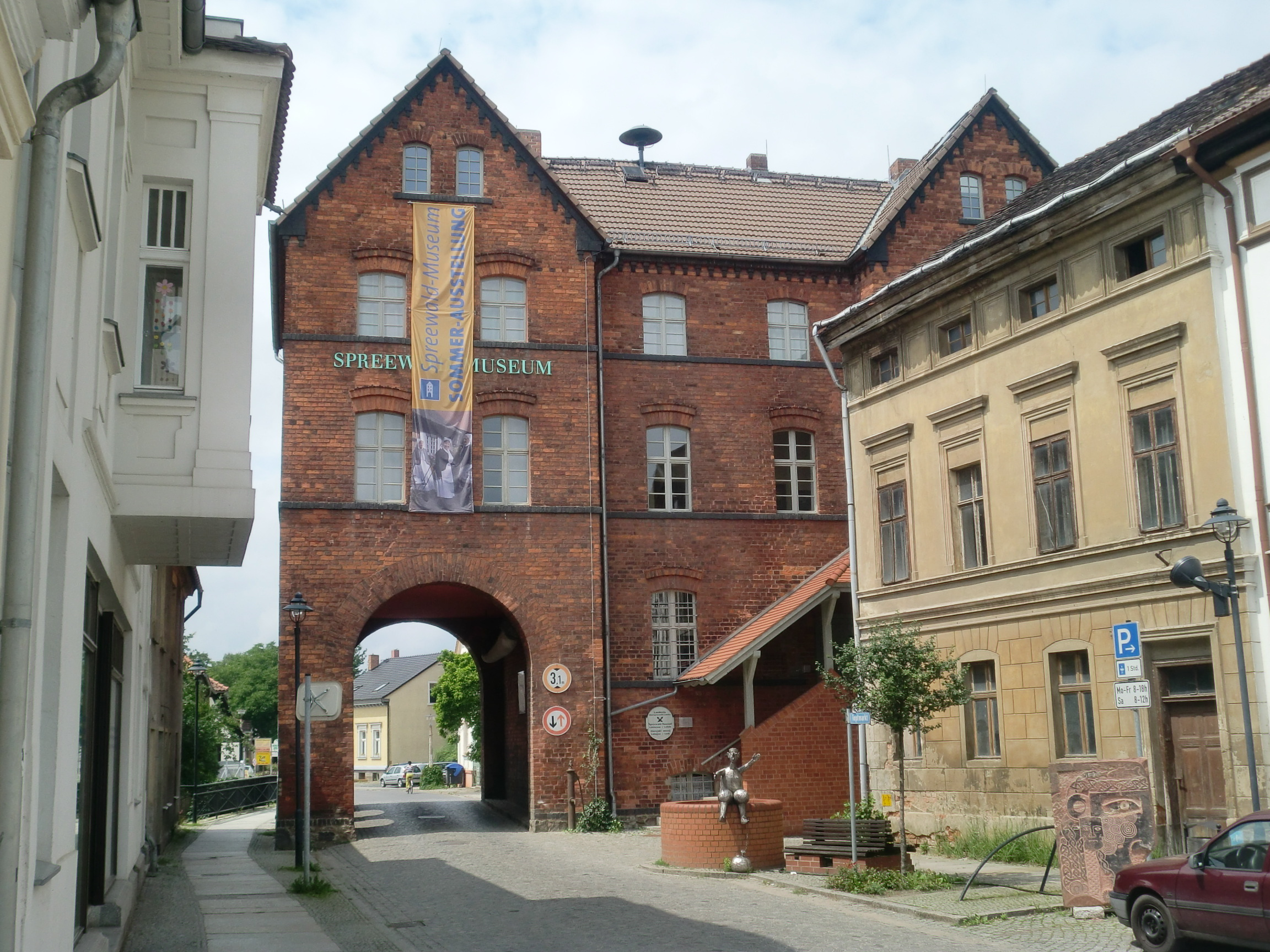 Spreewald-Museum in Lübbenau, Torbogenhaus, Ostseite